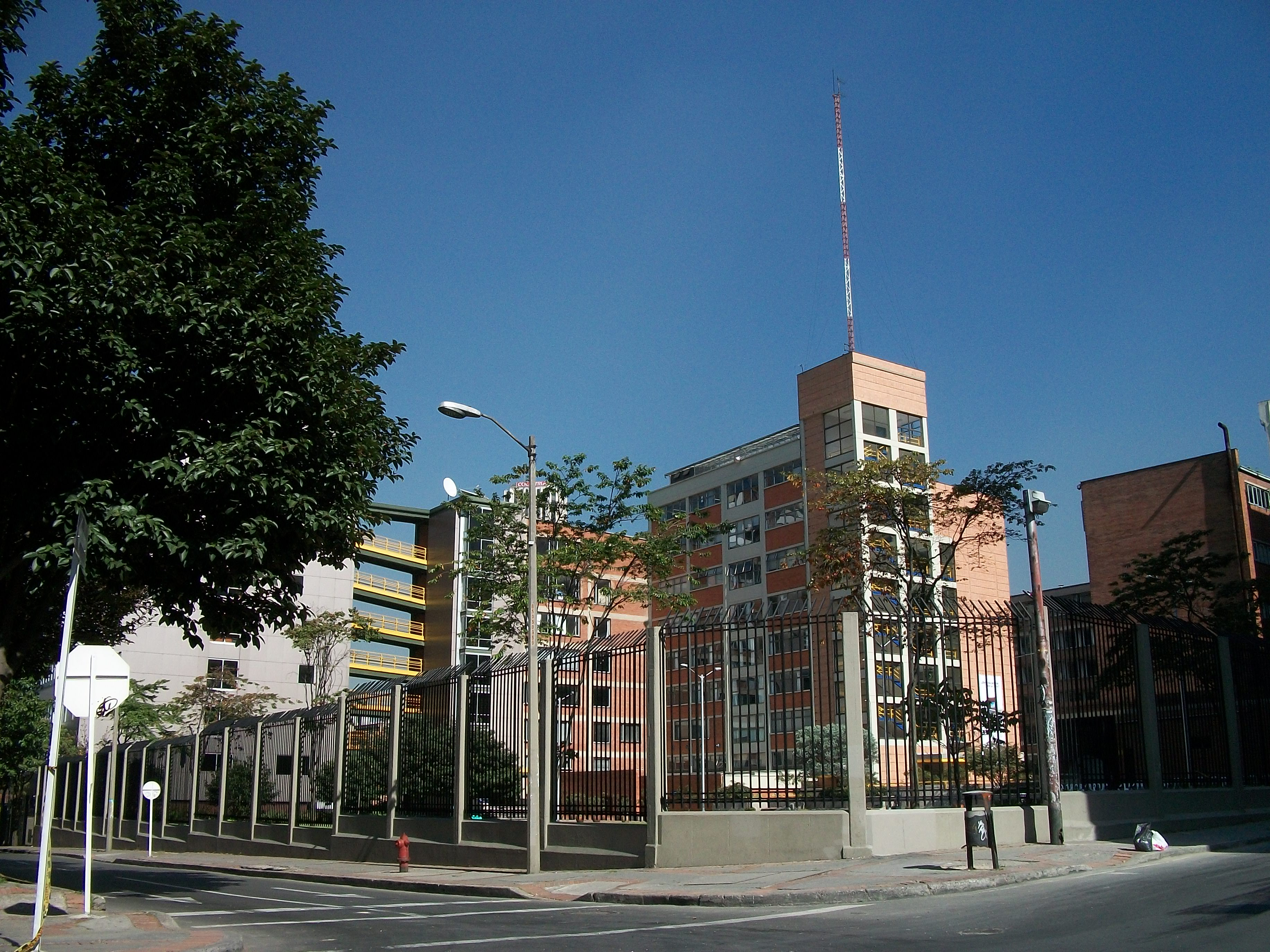 Sector A de la universidad Jorge Tadeo Lozano. Módulos 7, 8 & 13.